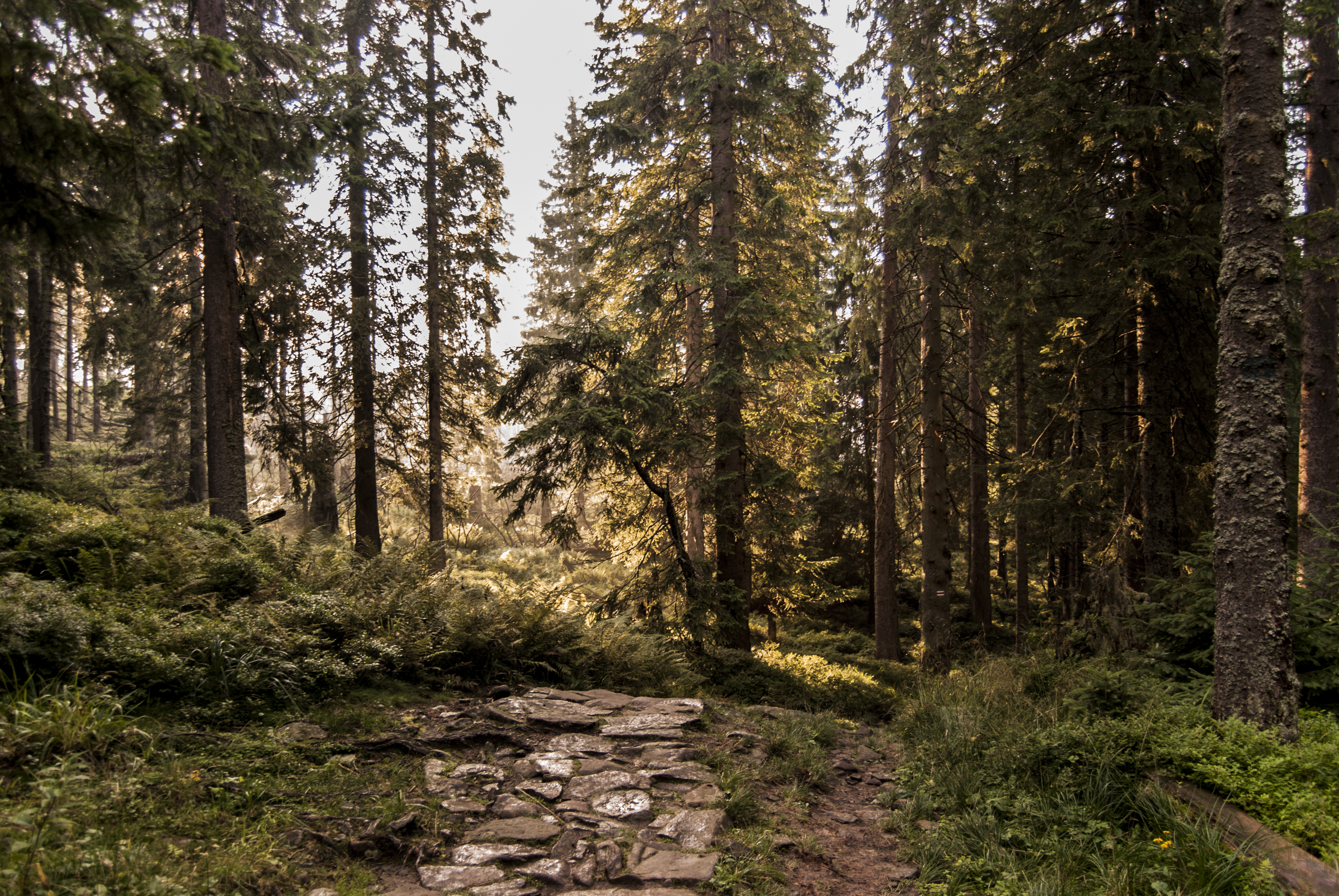 Park narodowy: Babiogórski Park Narodowy. Czerwony szlak na Babią Górę, wejście od schroniska PTTK na Markowych Szczawinach. Teren rezerwatu Biosfery i Natura 2000. This is a photography of protected area with CRFOP ID PL.ZIPOP.1393.PN.19